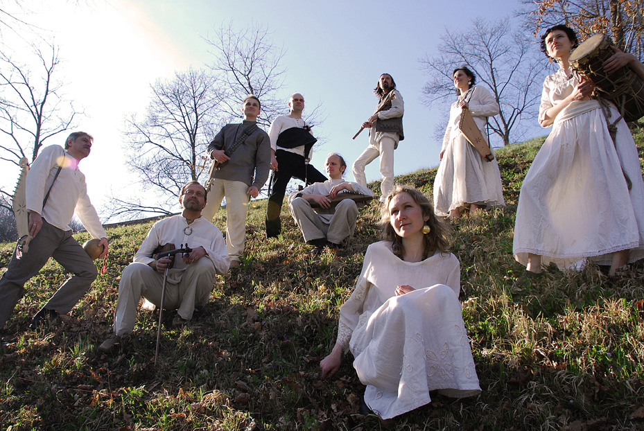 autorius Simonas Gutautas. Folkroko grupė Atalyja 2009 m. pavasarį prie Karmazinų piliakalnio